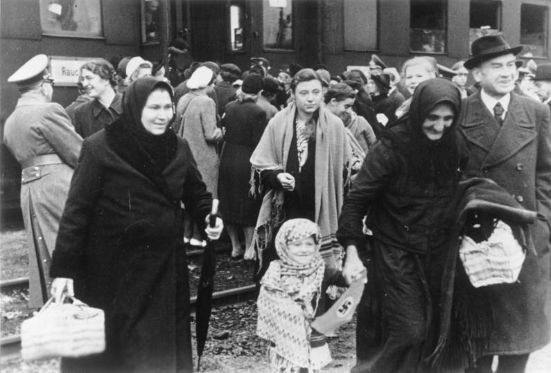 Die ersten Bessarabien-Rückwanderer in Deutschland eingetroffen. Im Zuge der grossen Umsiedlungs - Aktion in Südosteuropa trafen soeben die ersten Deutschen aus Bessarabien in der grossdeutschen Heimat ein. Die Organisationen der Partei, insbesondere die NSV, nahmen sich der Rücksiedler an, um sie in jeder Weise zu betreuen. Unser Bild zrigt die Ankunft des ersten Rückwanderer - Zuges in Böhmischleipa. 3.10.40 [Herausgabedatum] Scherl Bilderdienst, Berlin